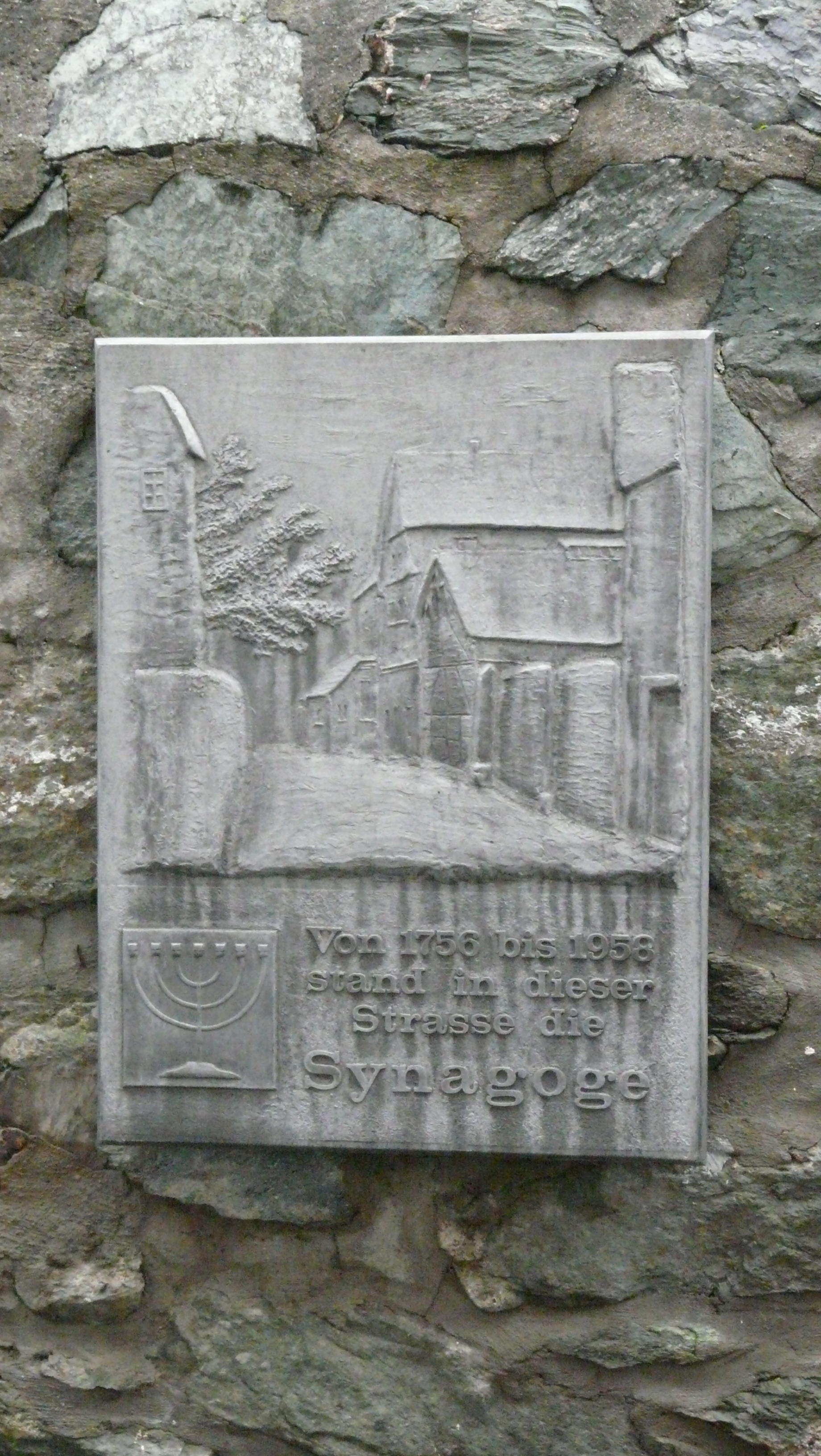 Gedenktafel in der Pfannenstielsgasse 8 am Standort der ehemaligen Synagoge in Wetzlar, Hessen